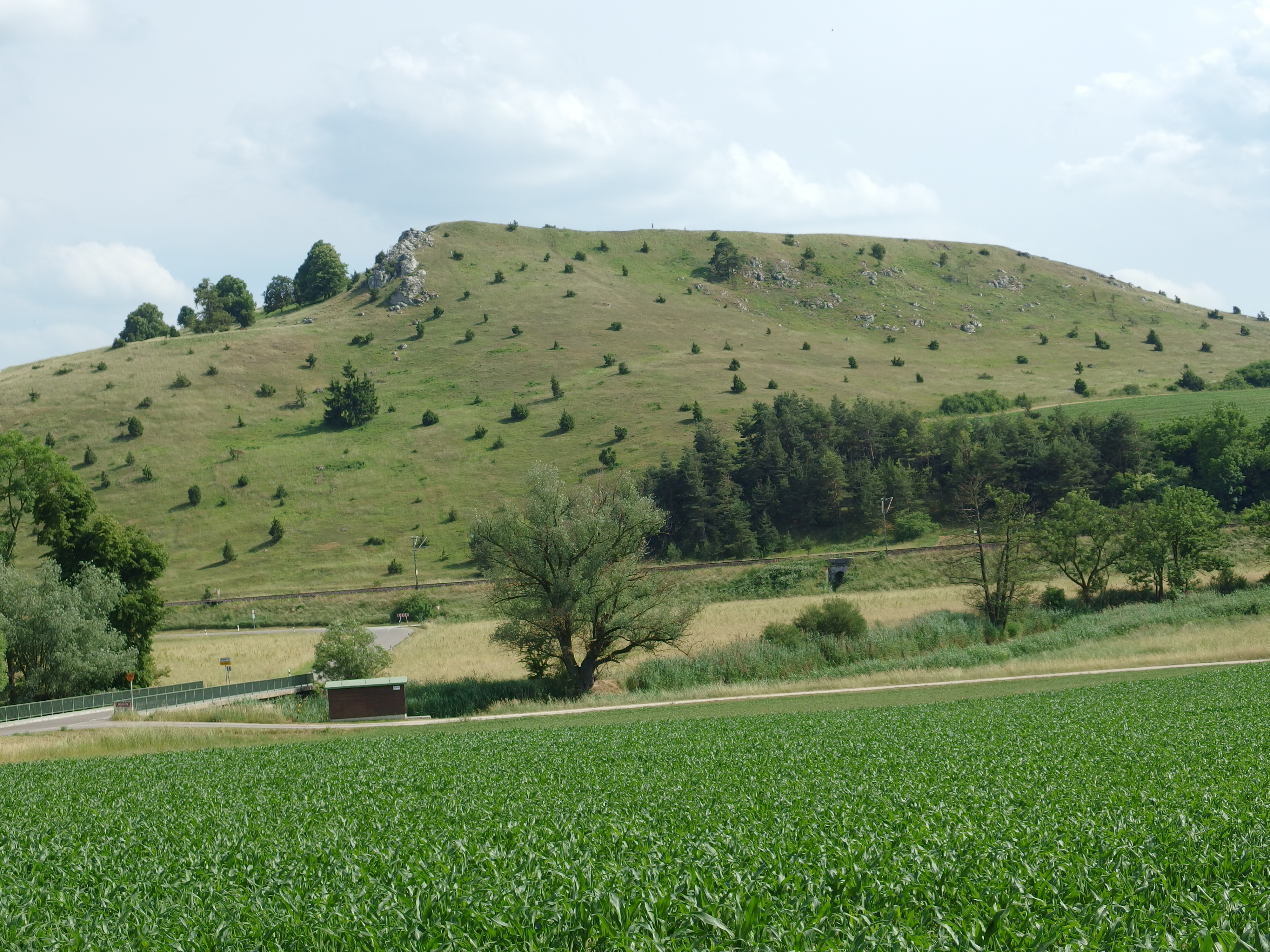 Blick zum Rollenberg bei Hoppingen, einem Ortsteil von Harburg (Schwaben) in Bayern; Auswurfgebirge der Rieskatastrophe mit typischem Trockenrasenbewuchs und Wacholderheide; auf dem Gipfel frühzeitliche Burganlage (spätbronzezeitliche Wallanlage, Kulturdenkmal); der Rollenberg ist laut topografischer Karte ein Naturdenkmal.